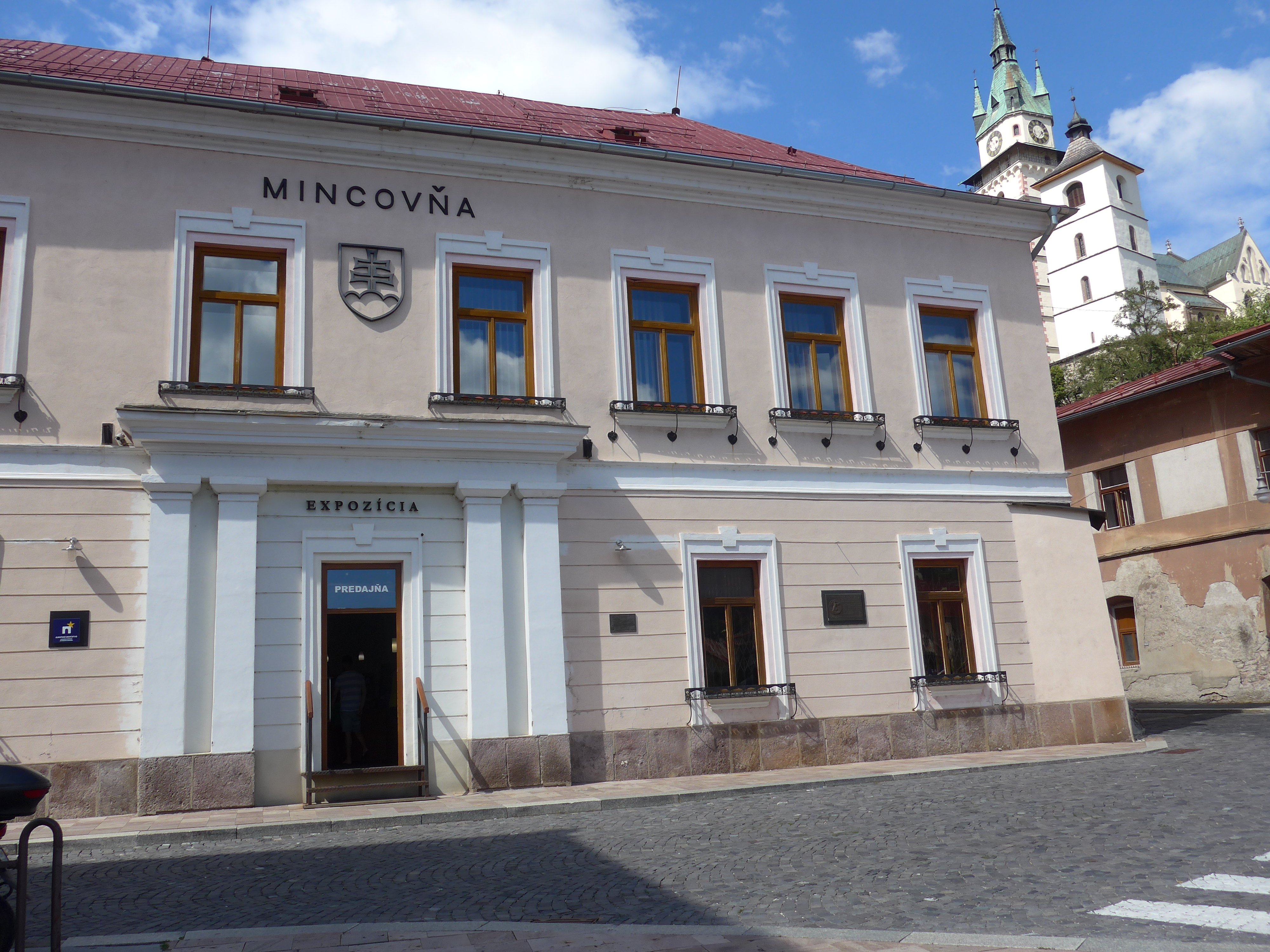 Budova se nachází na Štefáníkově náměstí pod hradem